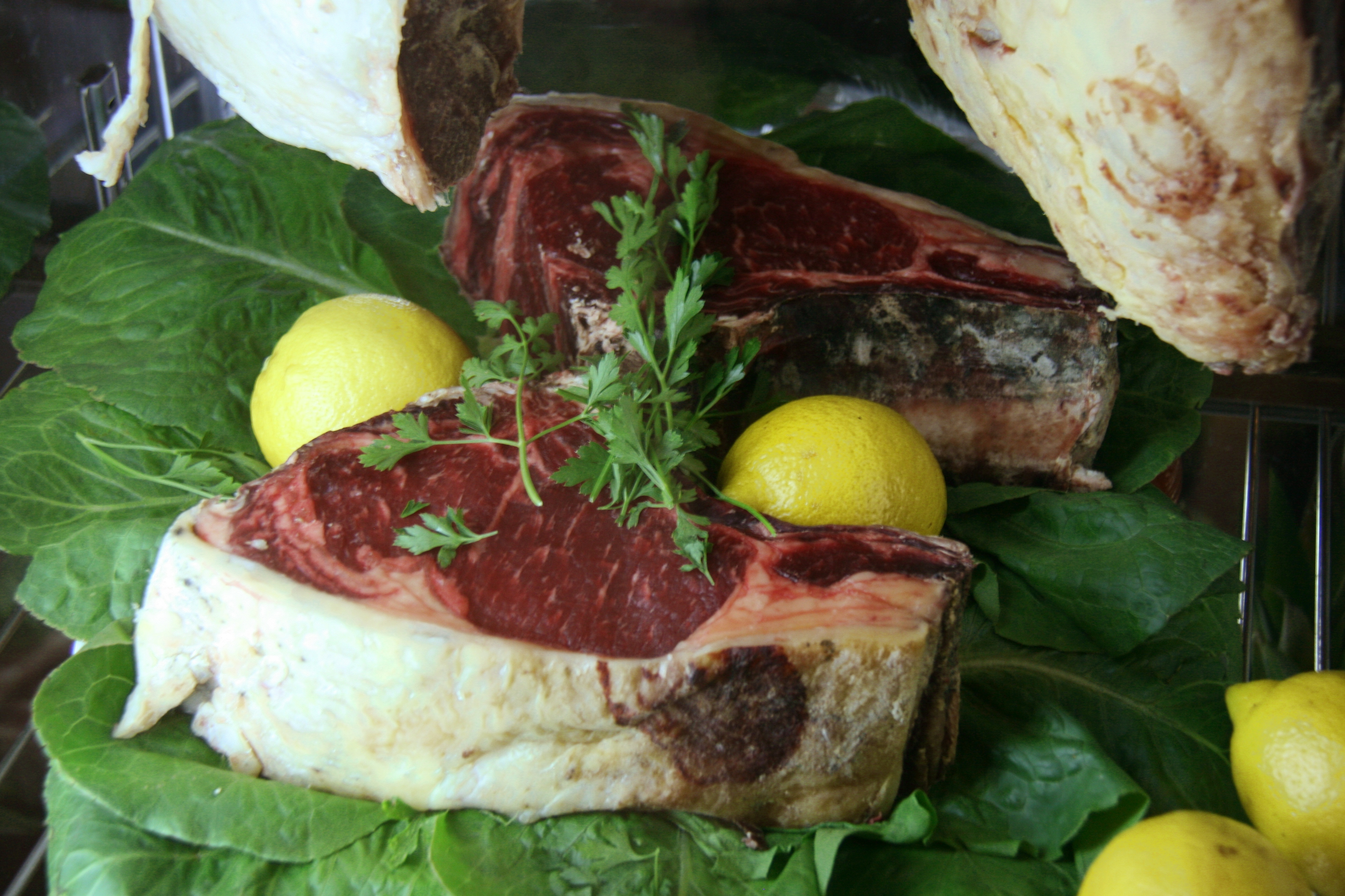 Chuleta